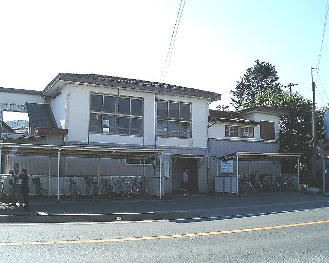 尾奈駅